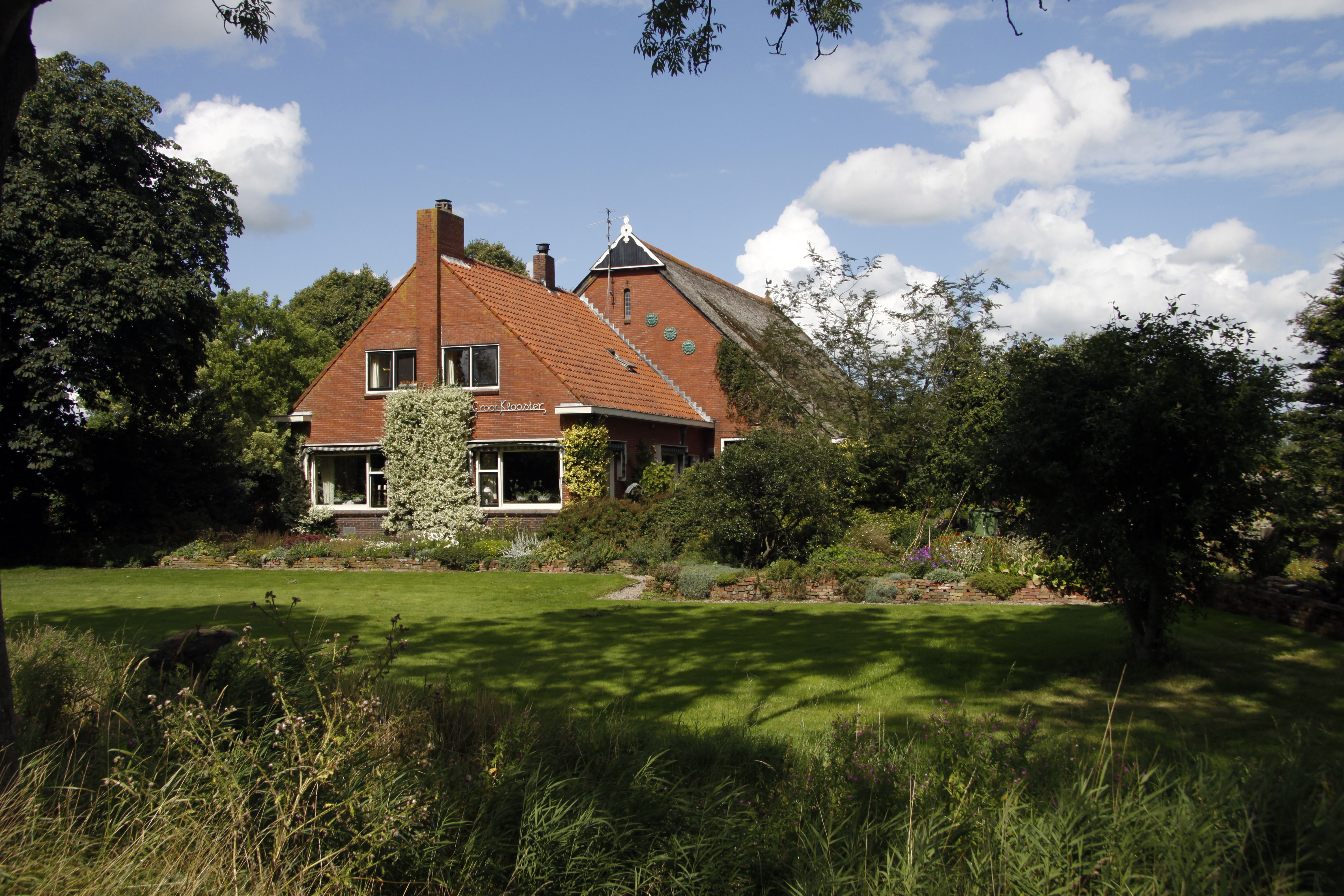 Boerderij van het kop-romptype in landelijke bouwstijl met Interbellum-elementen (Groot Klooster)